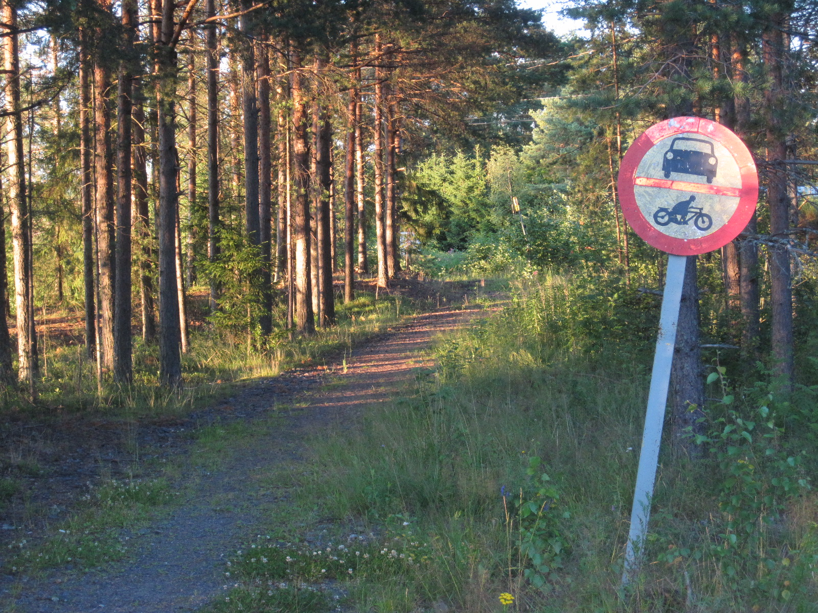 Vanha moottoriajoneuvokielto-liikennemerkki Kempeleen Asemanseudun alueella Sepäntien peräkulmilla. Polku vie metsän takana olevalle Pohjanmaan radalle. Junaradan toisella puolen on nykyinen Ristisuon asuinalue.